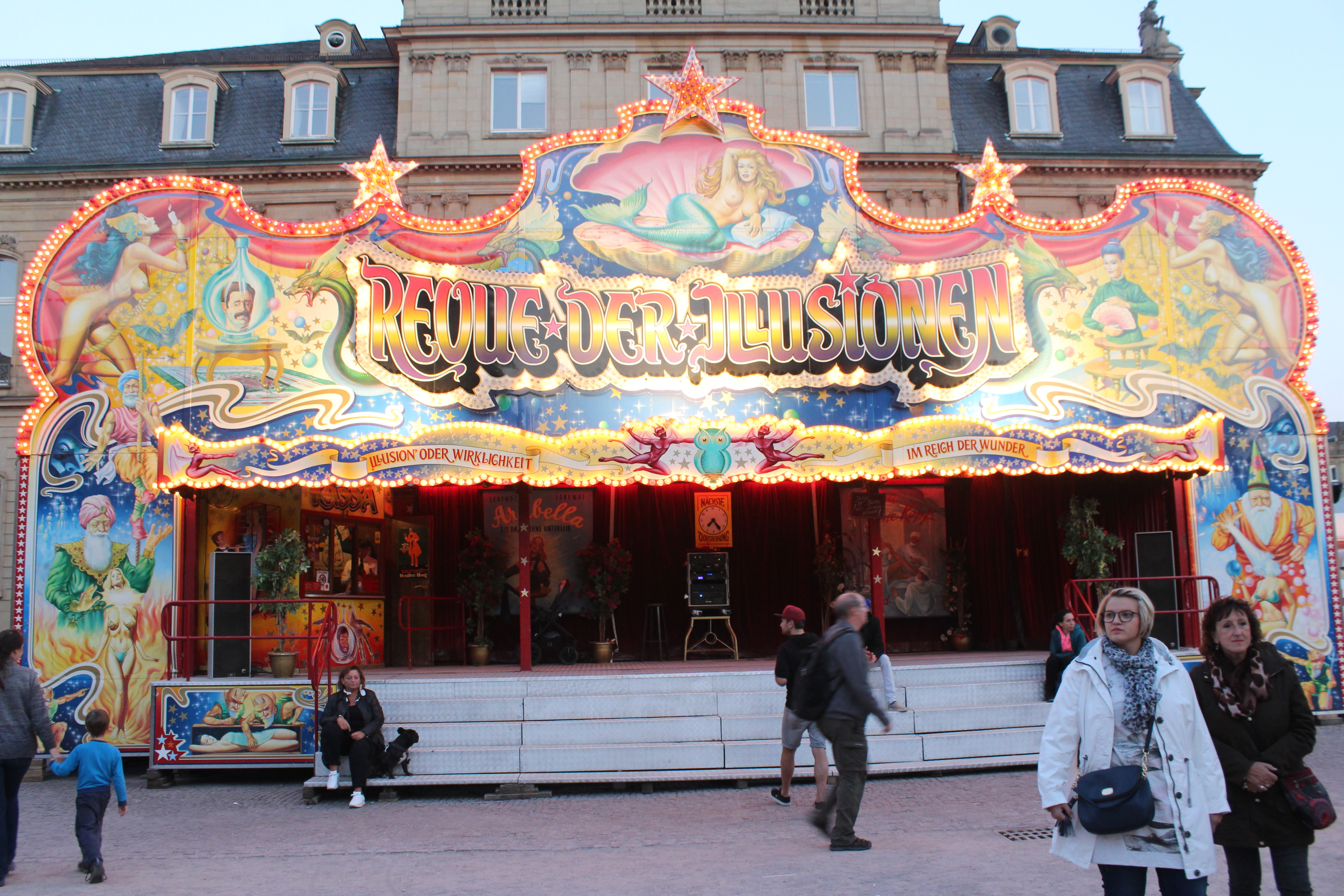 Illusionsshow auf dem Historischen Volksfest Stuttgart 2018